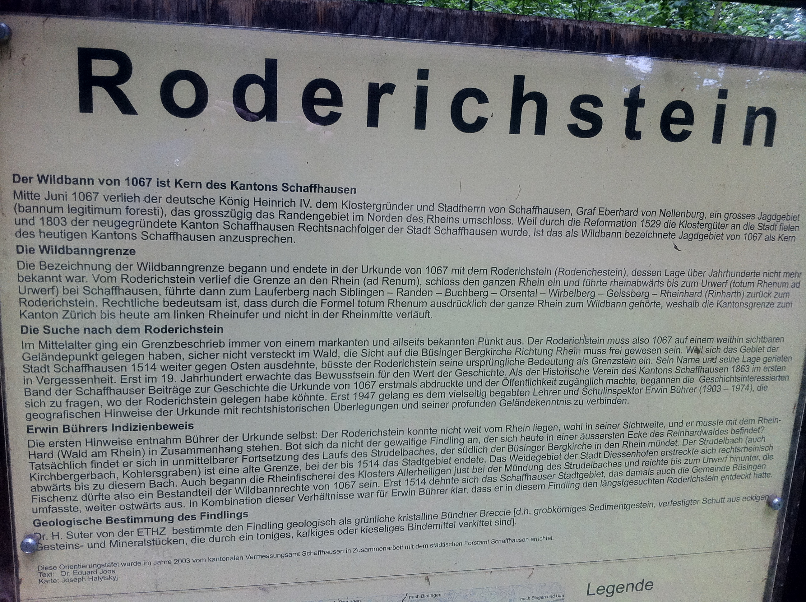 Orientierungstafel zum Roderichstein mit Text von Dr. Eduard Joos